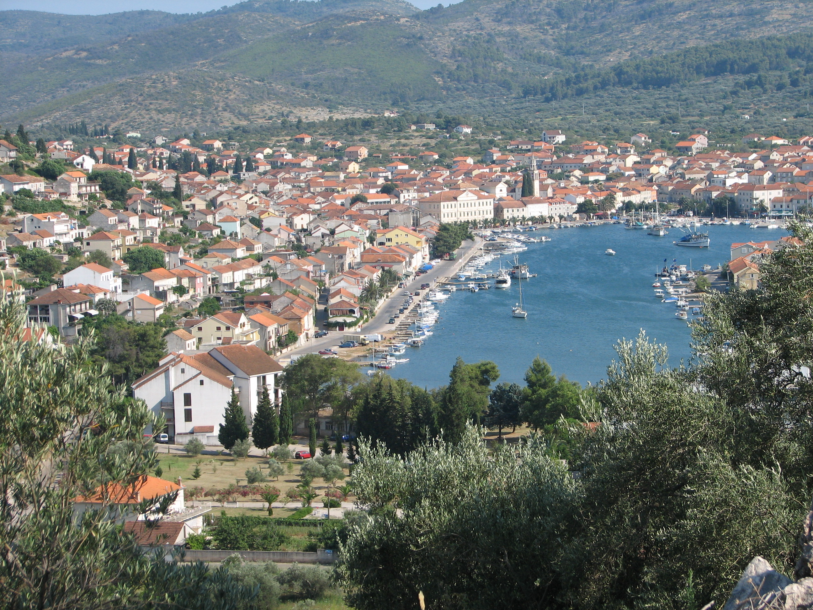 Vela Luka (Chorwacja) widok z wzgórz